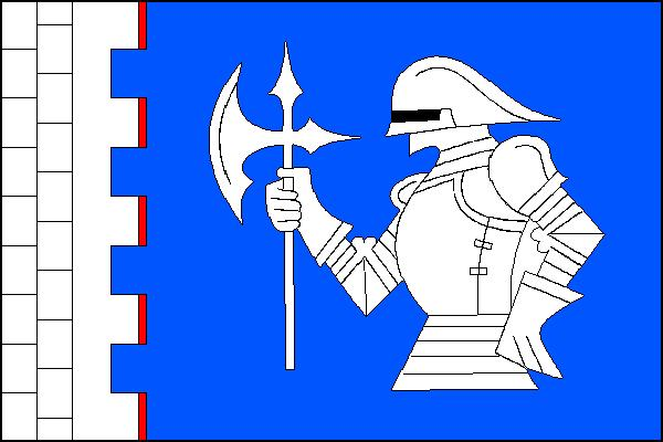 Vlajka obce Březno v okrese Chomutov